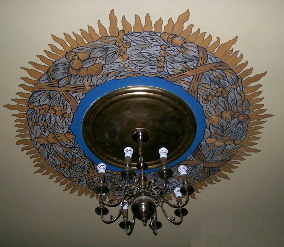 żyrandol